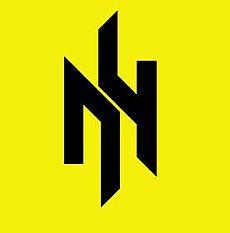 Patriot of Ukraine (Ukranian: «Патріот України») emblem - runic monogram created of the initial leters "П" and "У". Організація «Патріот України», як емблему, використовує монограму «ПУ» — стилізоване під рунічну писемність зображення заголовних літер «П» та «У».